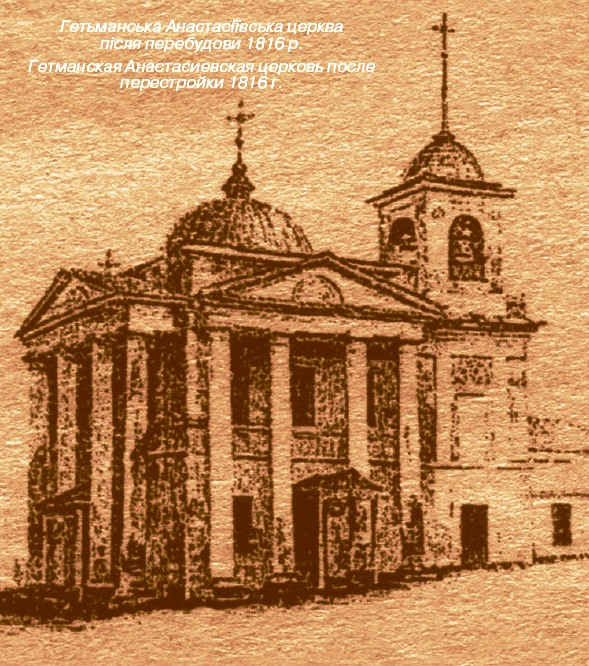 Анастасіївська (стара) церква після реконструкції 1816 року